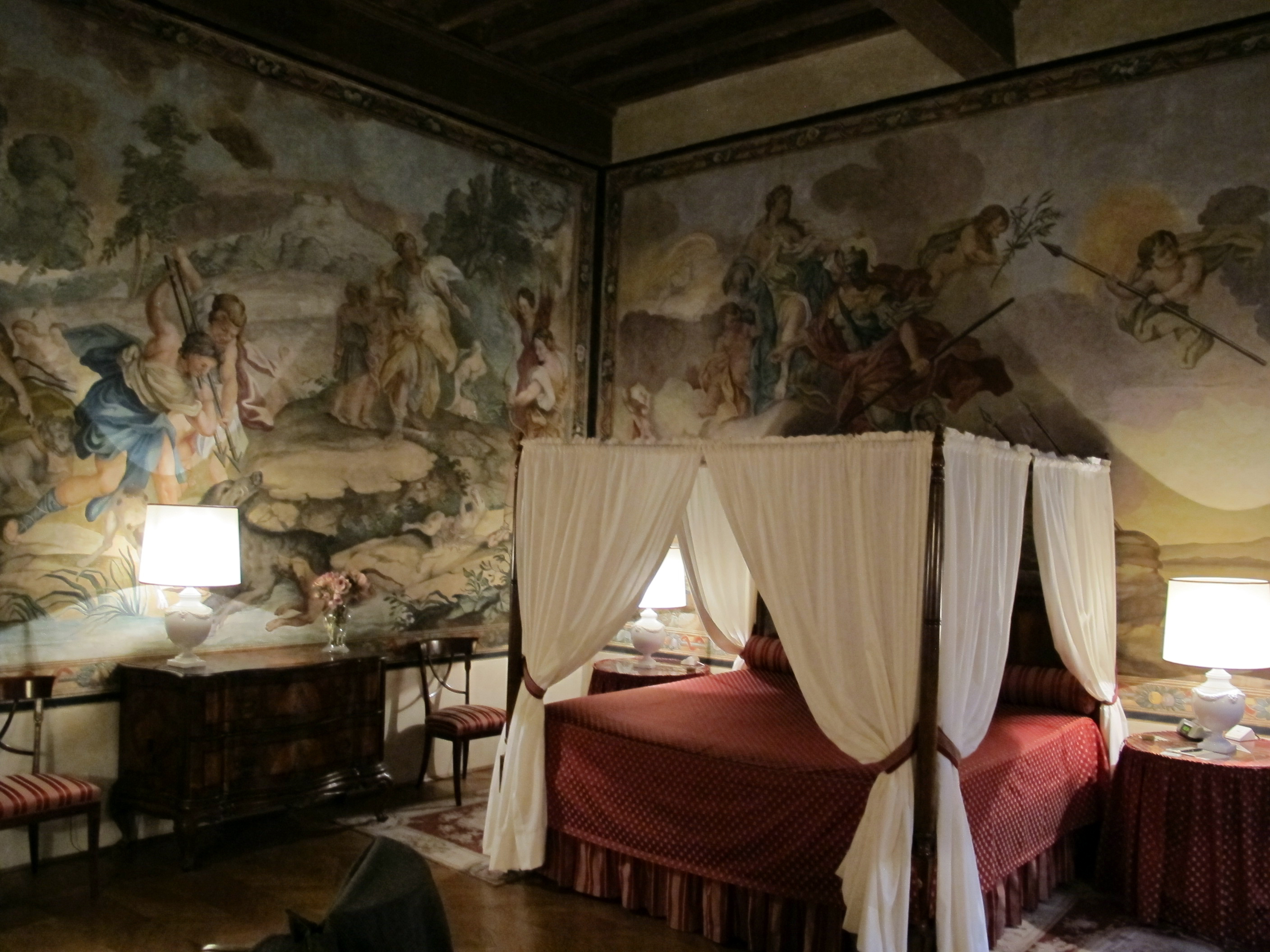 Palazzo niccolini al duomo, sala della caccia